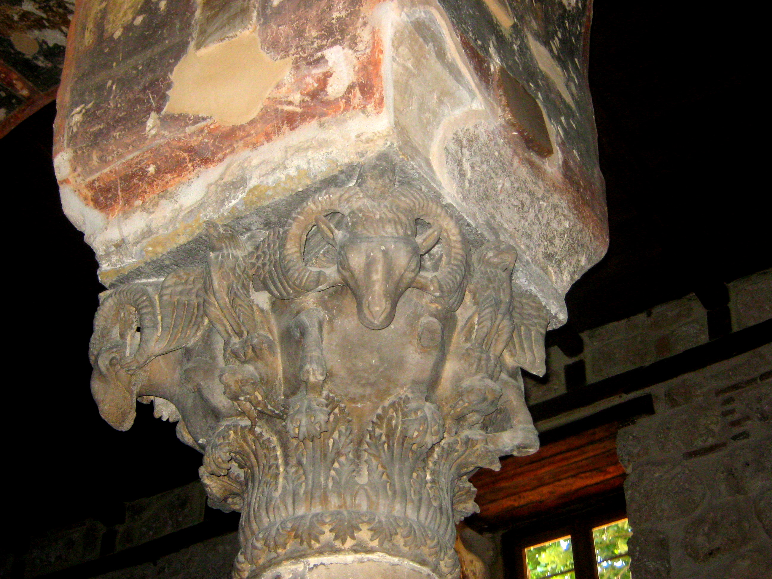 Ναός Παλαιάς Μητρόπολης Έδεσσας«Ναός Παλαιάς Μητρόπολης Έδεσσας»